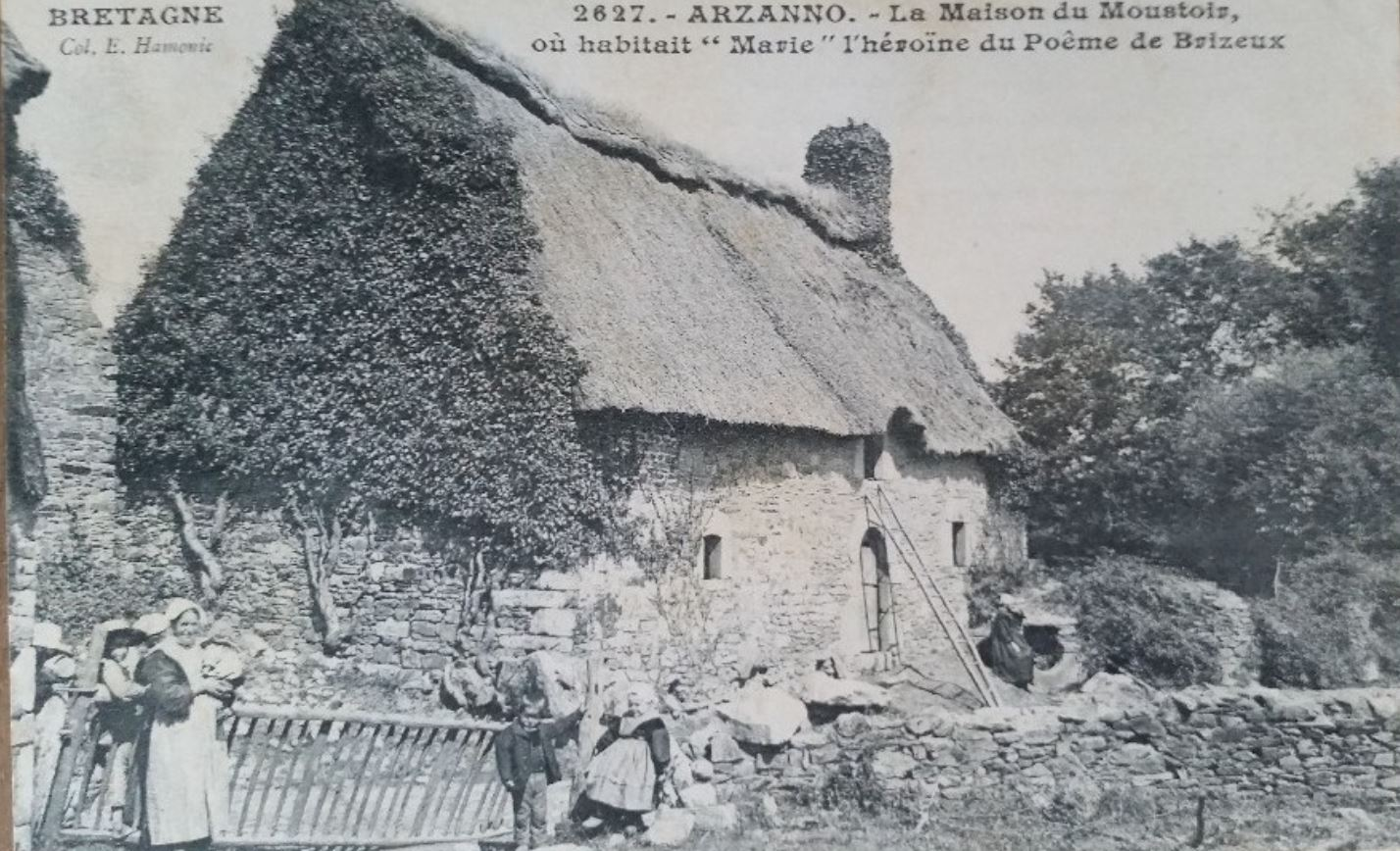 Chaumière du village du Moustoir en Arzano où vivait Marie Penlan, la muse du poète Auguste Brizeux (carte postale du début du XXe siècle)